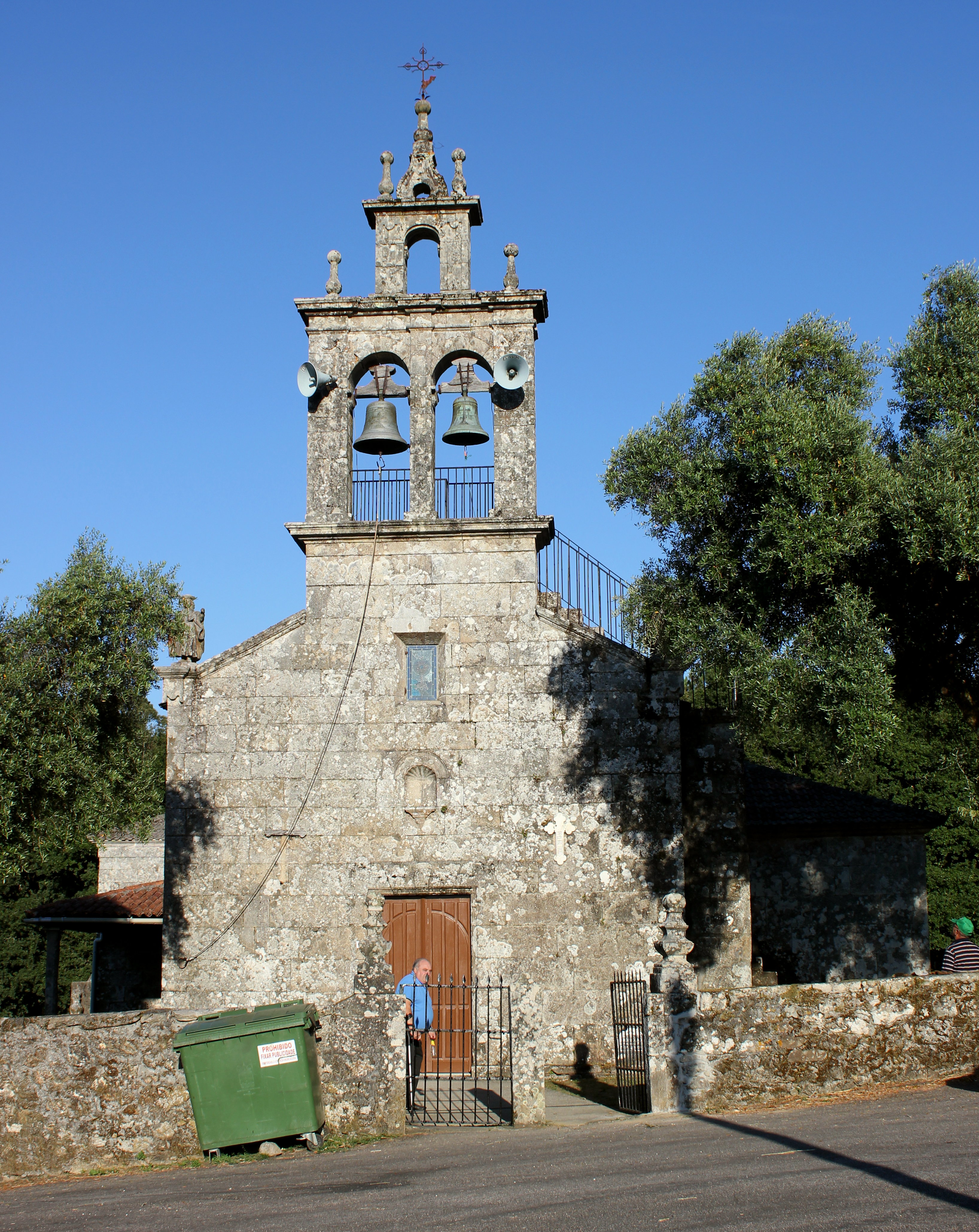 Igrexa de Aguións, A Estrada.